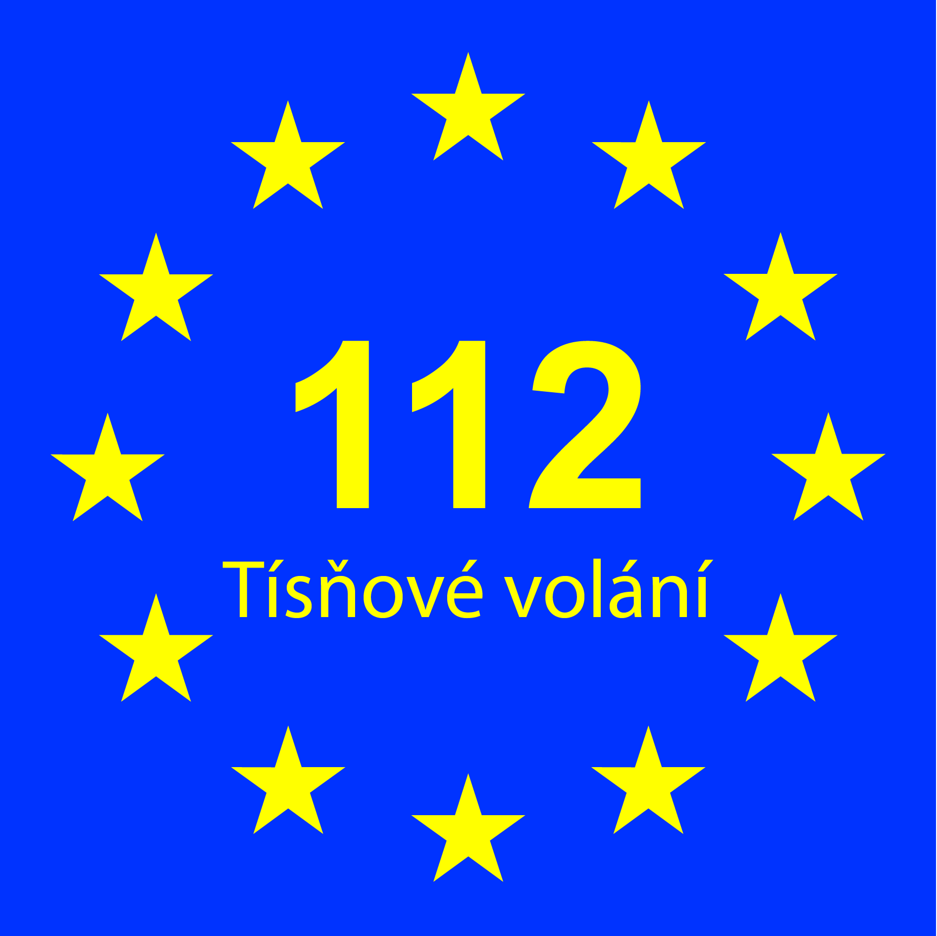 Logo 112 tísňové volání, Jednotné evropské číslo tísňového volání